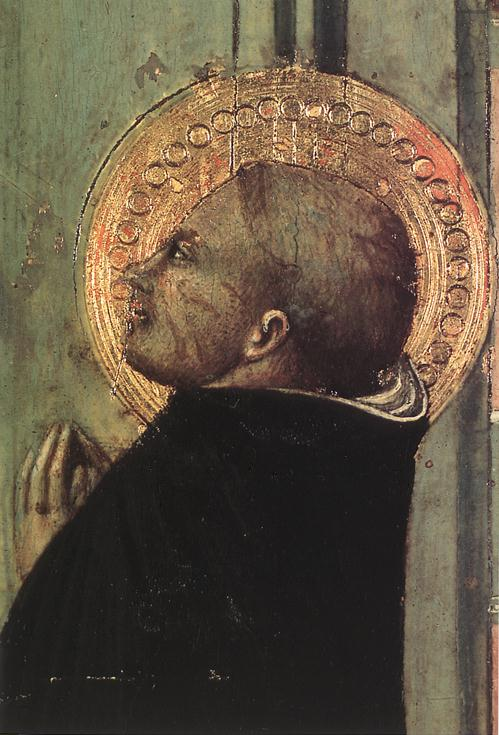 detail